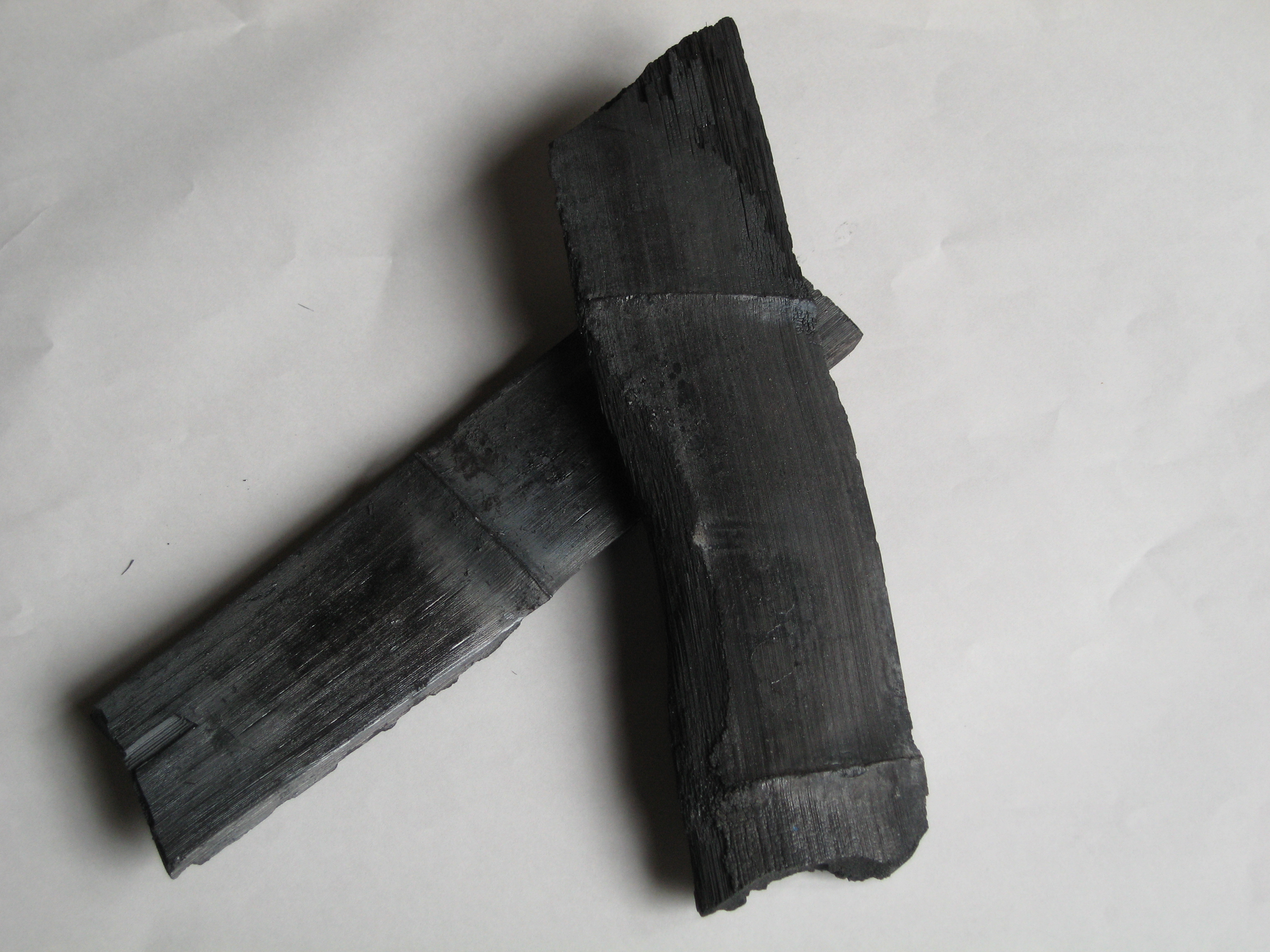 日本の竹炭